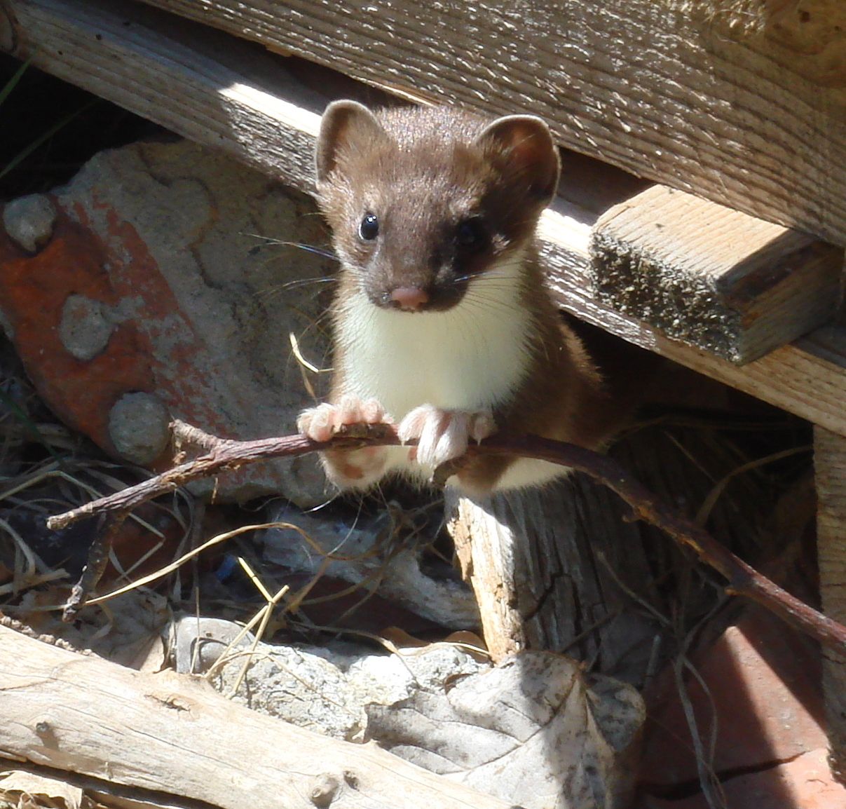 Neugieriges Mauswiesel